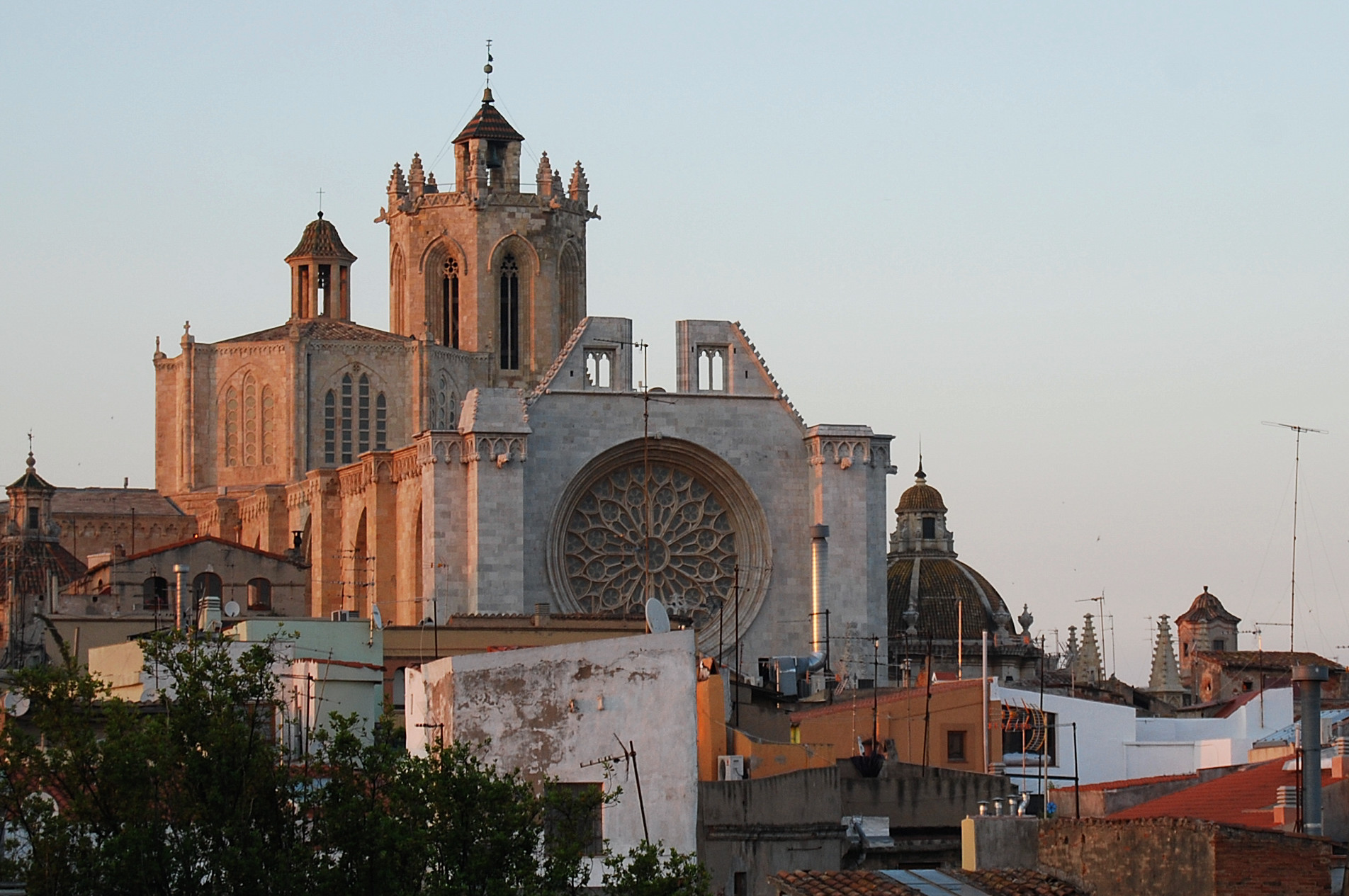 Catedral de Santa Maria (Tarragona)